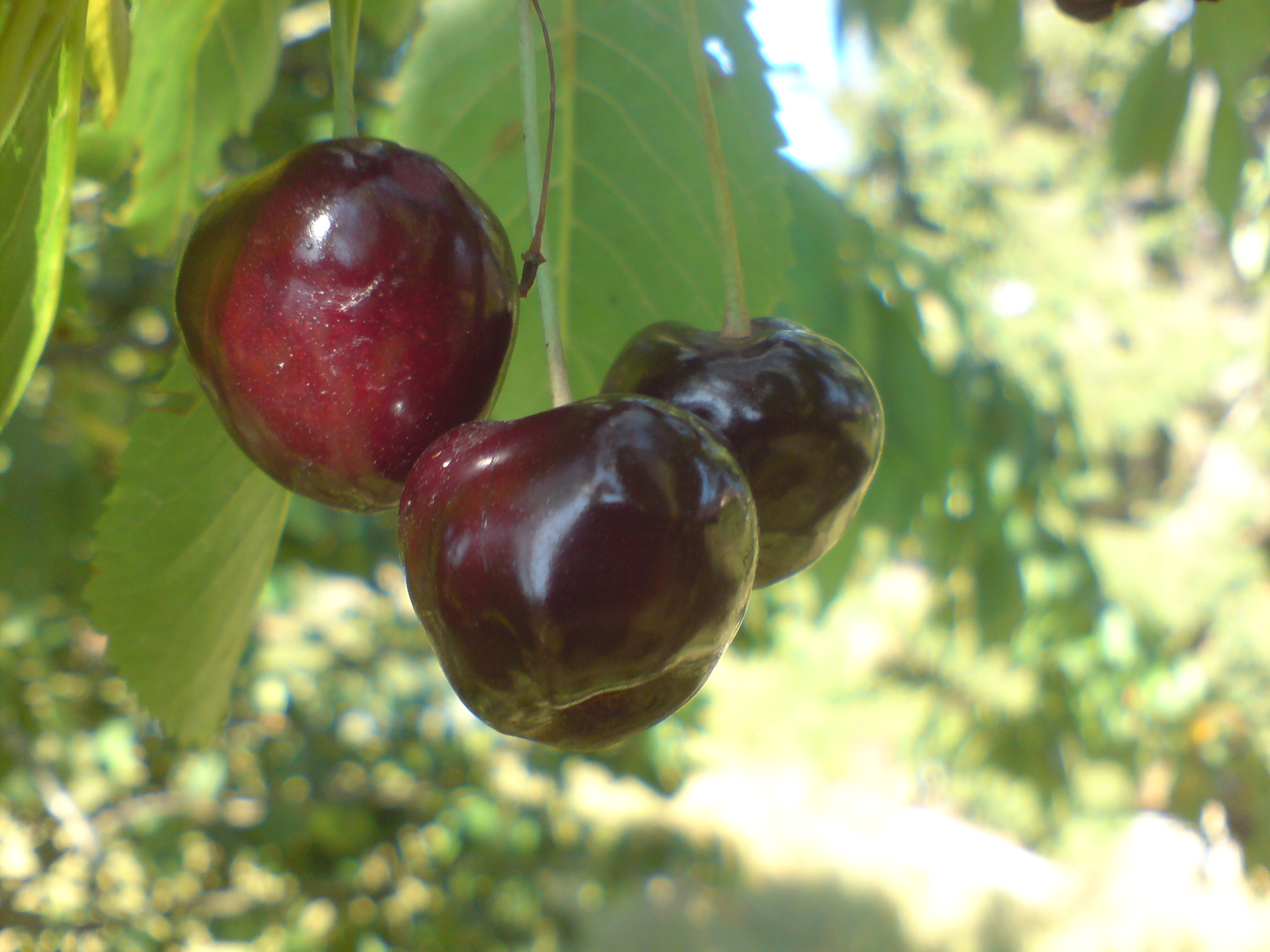 Früchte der Kirschsorte Valeska. Eine Sorte aus dem alten Land